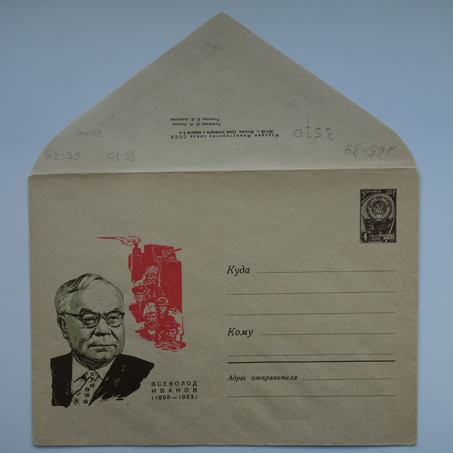 Иванов Всеволод Вячеславович, почтовый конверт